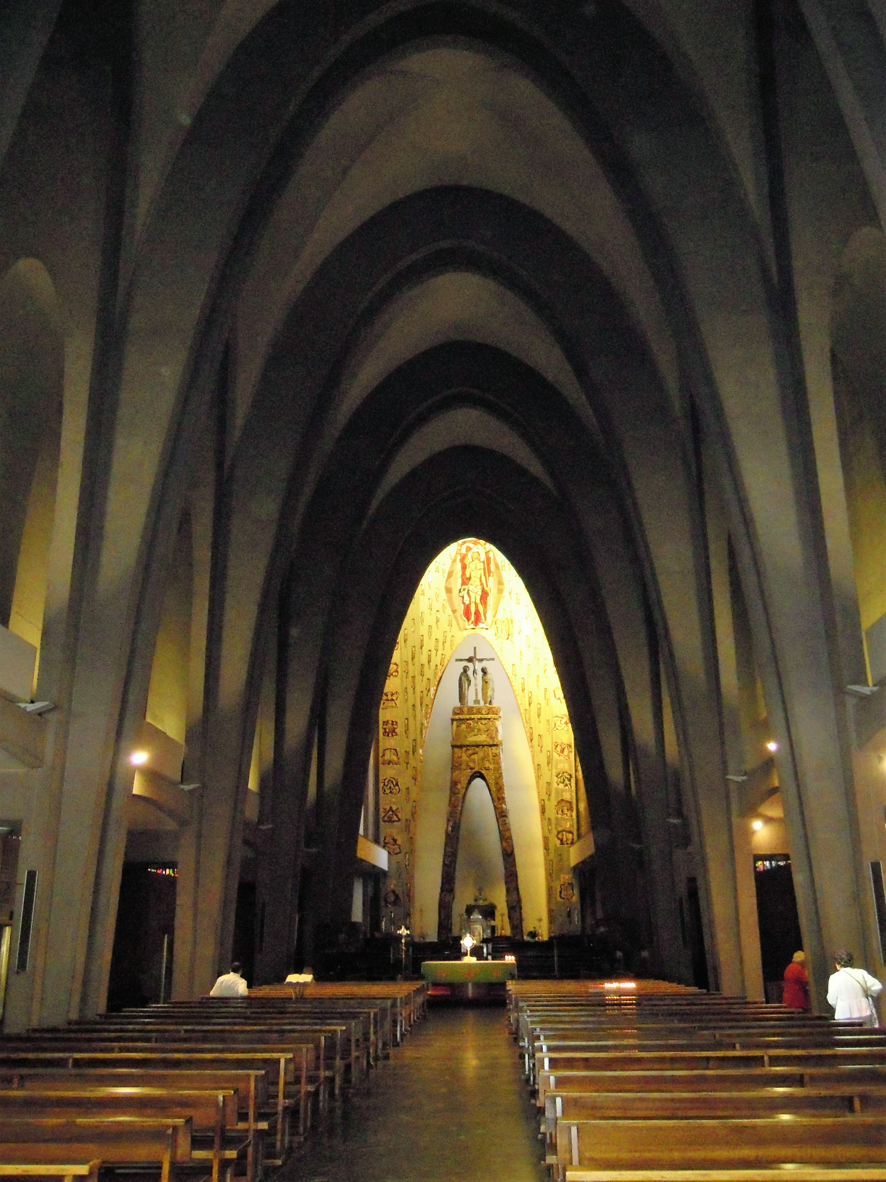 Roma, interno della chiesa di Nostra Signora del Santissimo Sacramento e dei Santi martiri canadesi